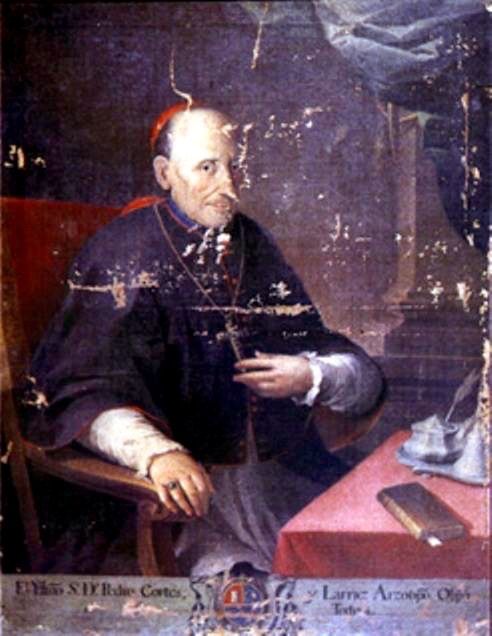 Arzobispo Pedro Cortés y Larraz